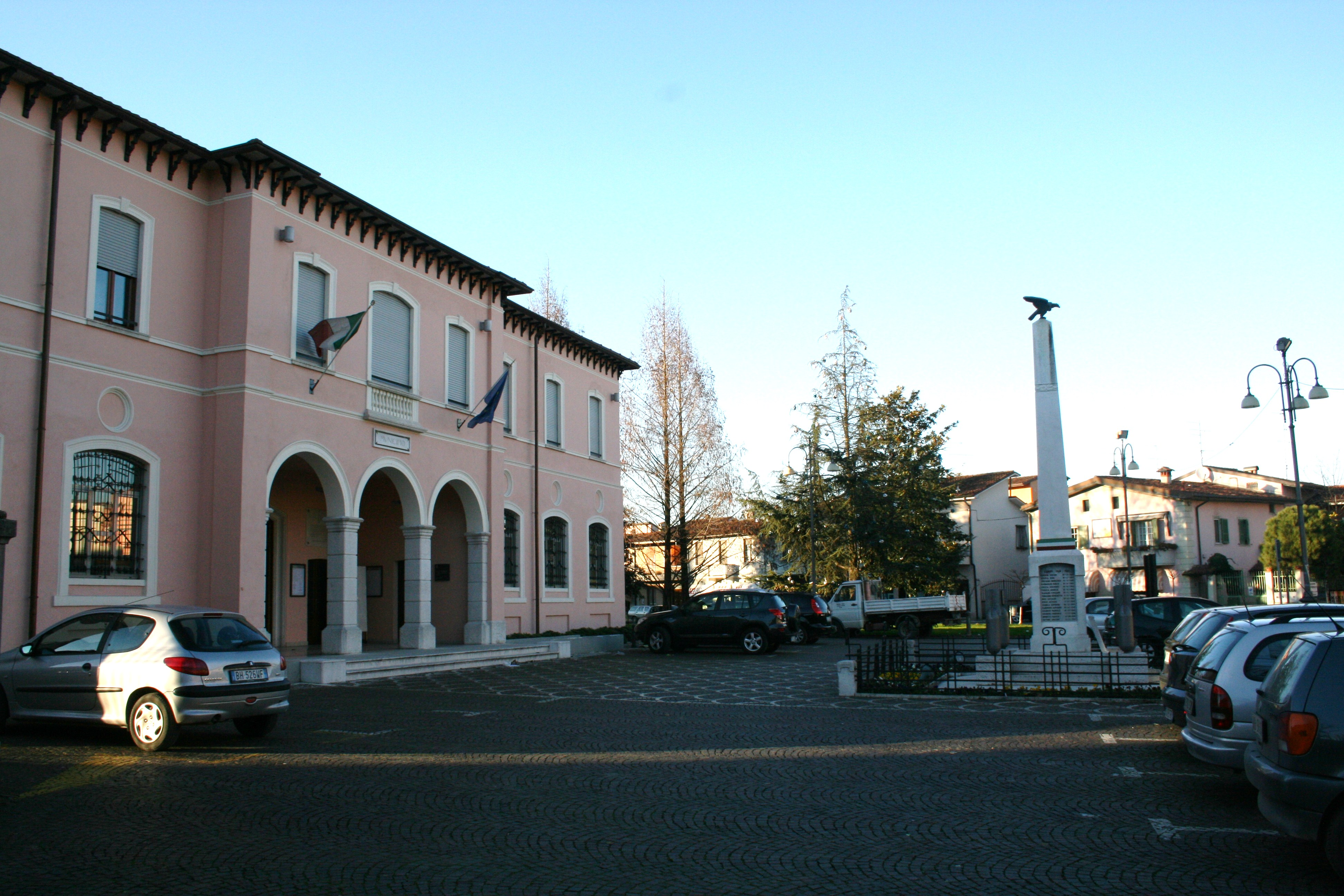 Comune di Flero